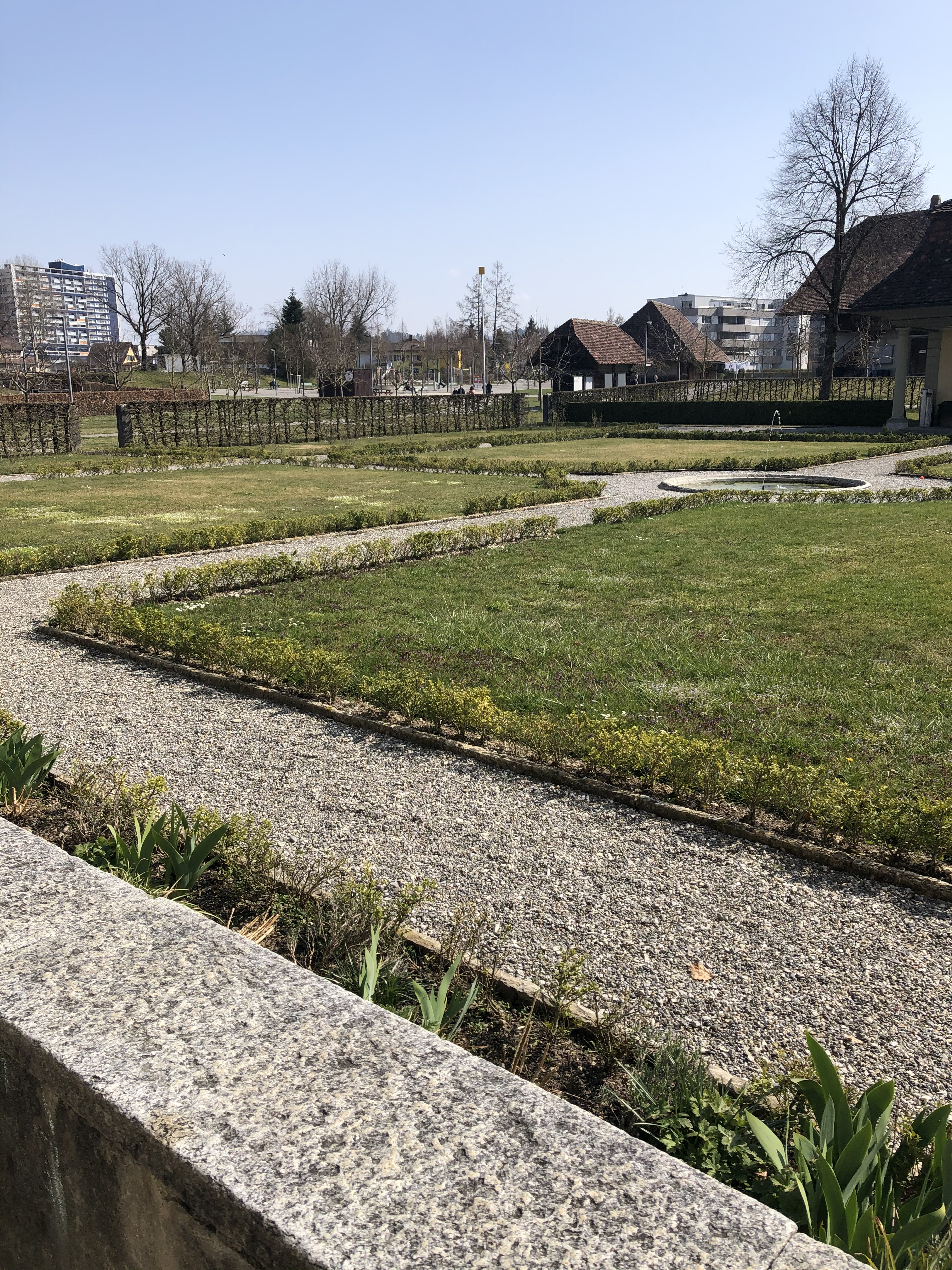 Brünnen: Blick vom Schlössli in die Parkanlage Brünnengut